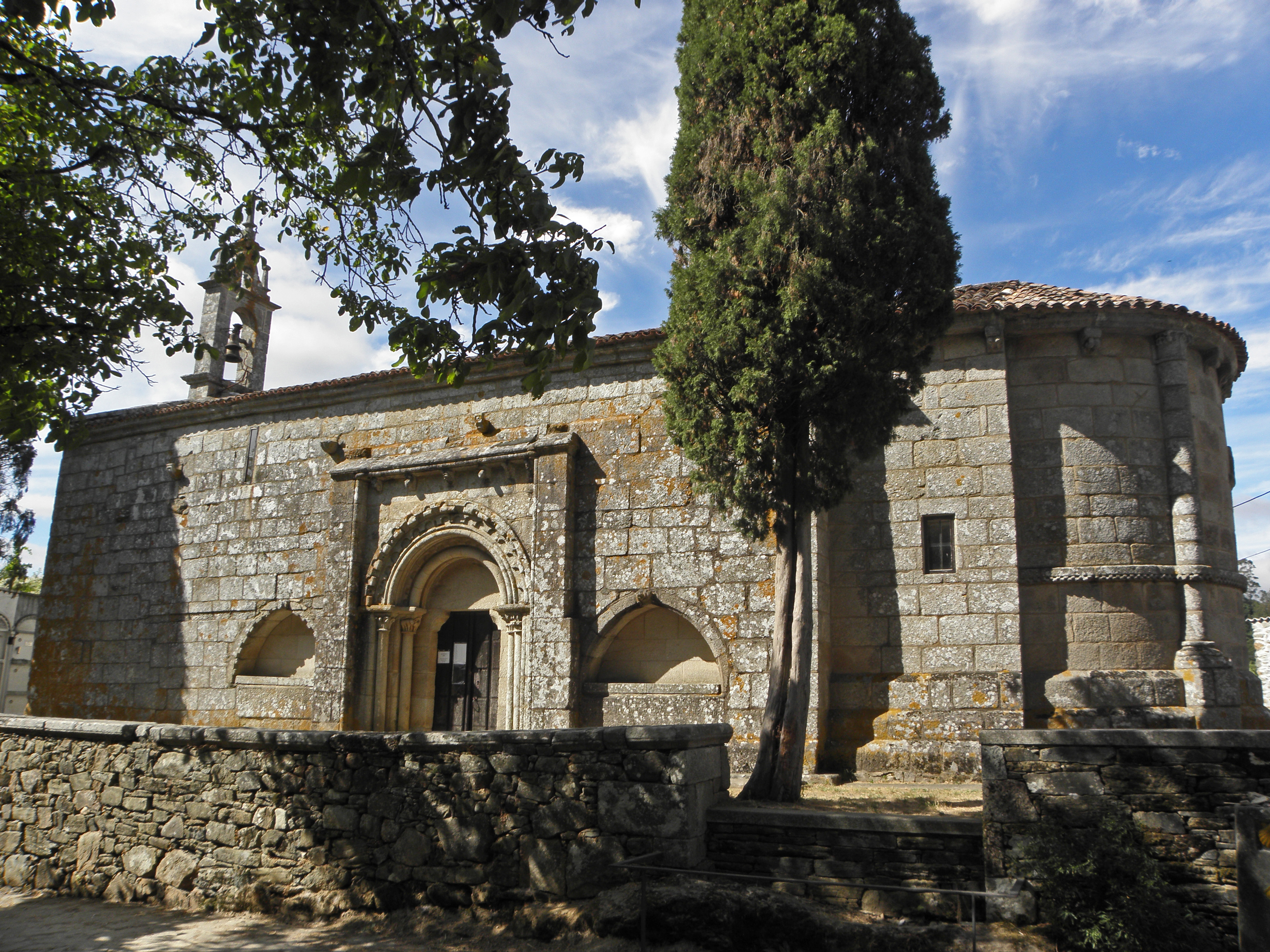 Igrexa de Santa María de Melide, Melide